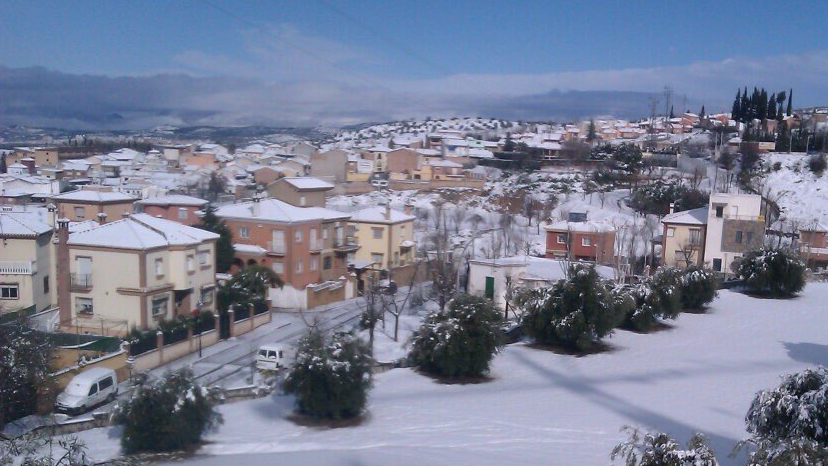 Vista de la localidad española de Jun (provincia de Granada) en el invierno de 2013.